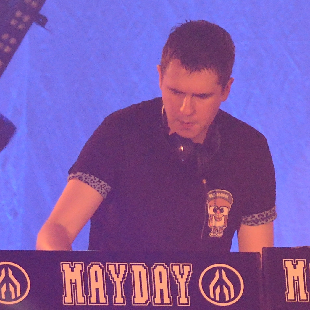 Kutski bei Mayday 2014.